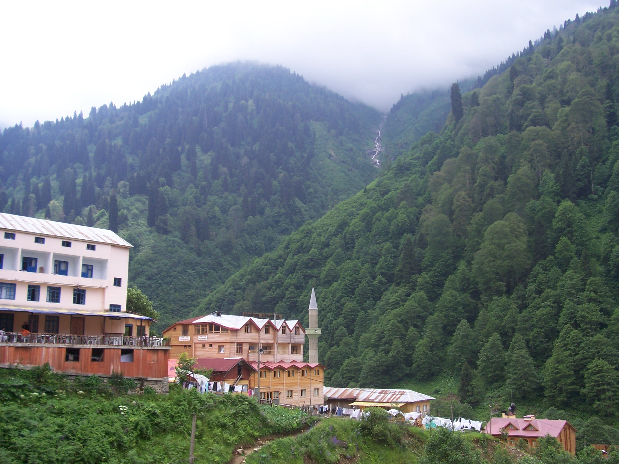 AYDER